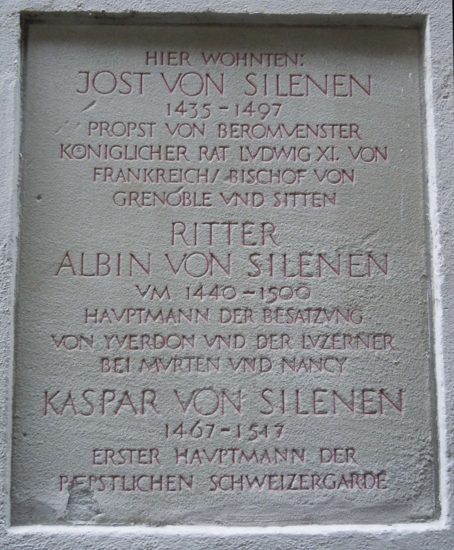 Gedenkplatte für Jost, Albin und Kapar von Silenen in der Schlossergasse Luzern